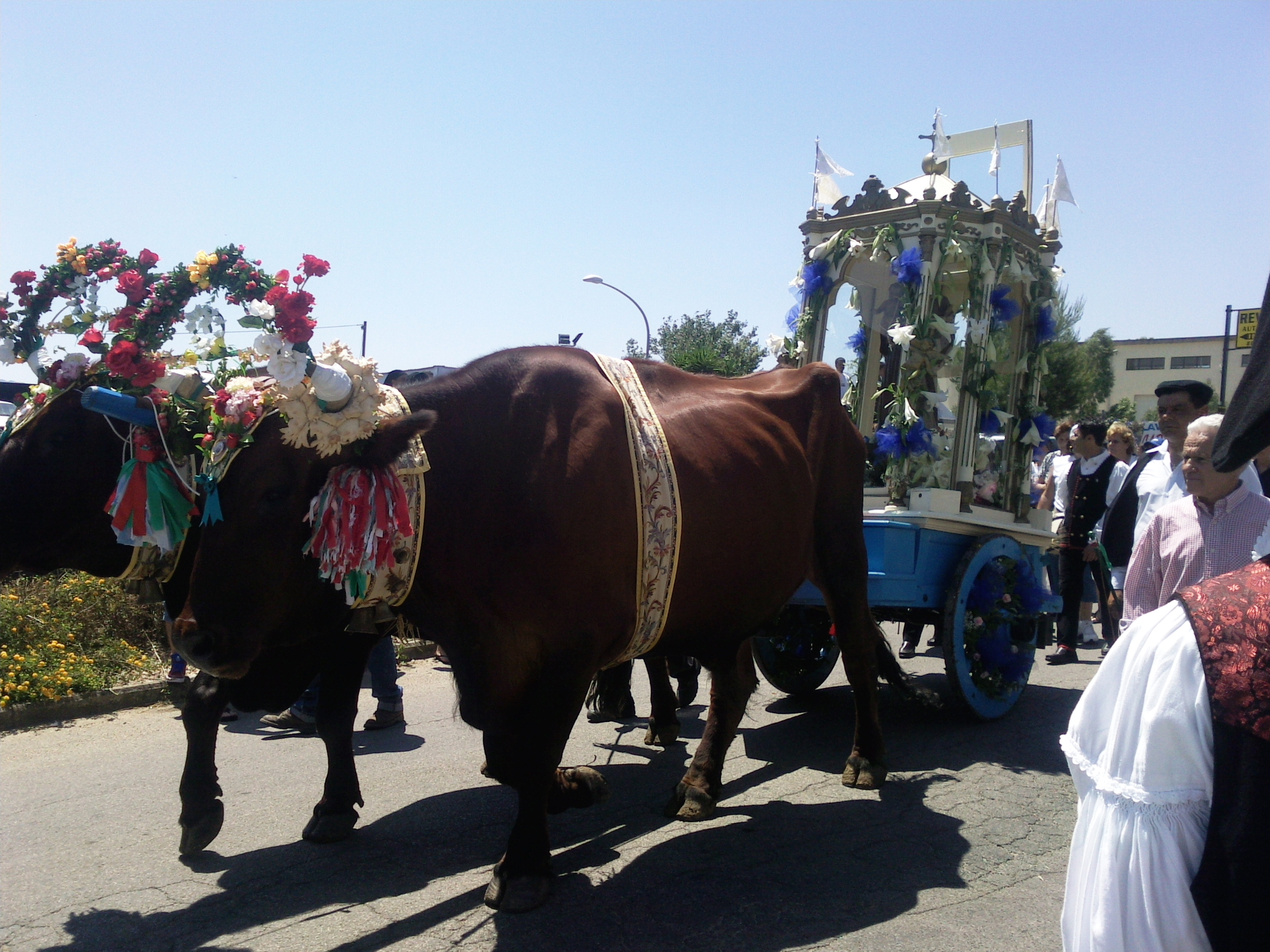 traccas, carro processionale tipico della sardegna